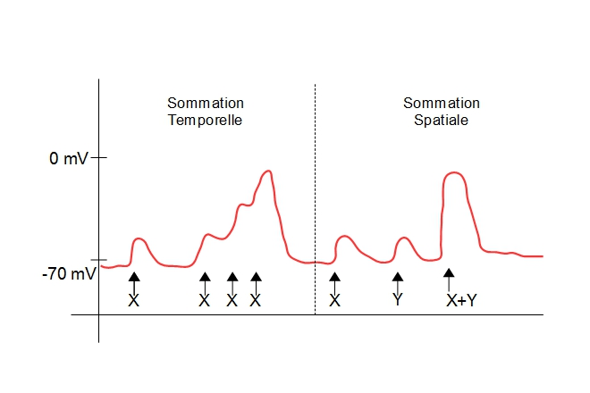 Graphique décrivant la différence entre sommation spatiale et temporelle des potentiels gradués